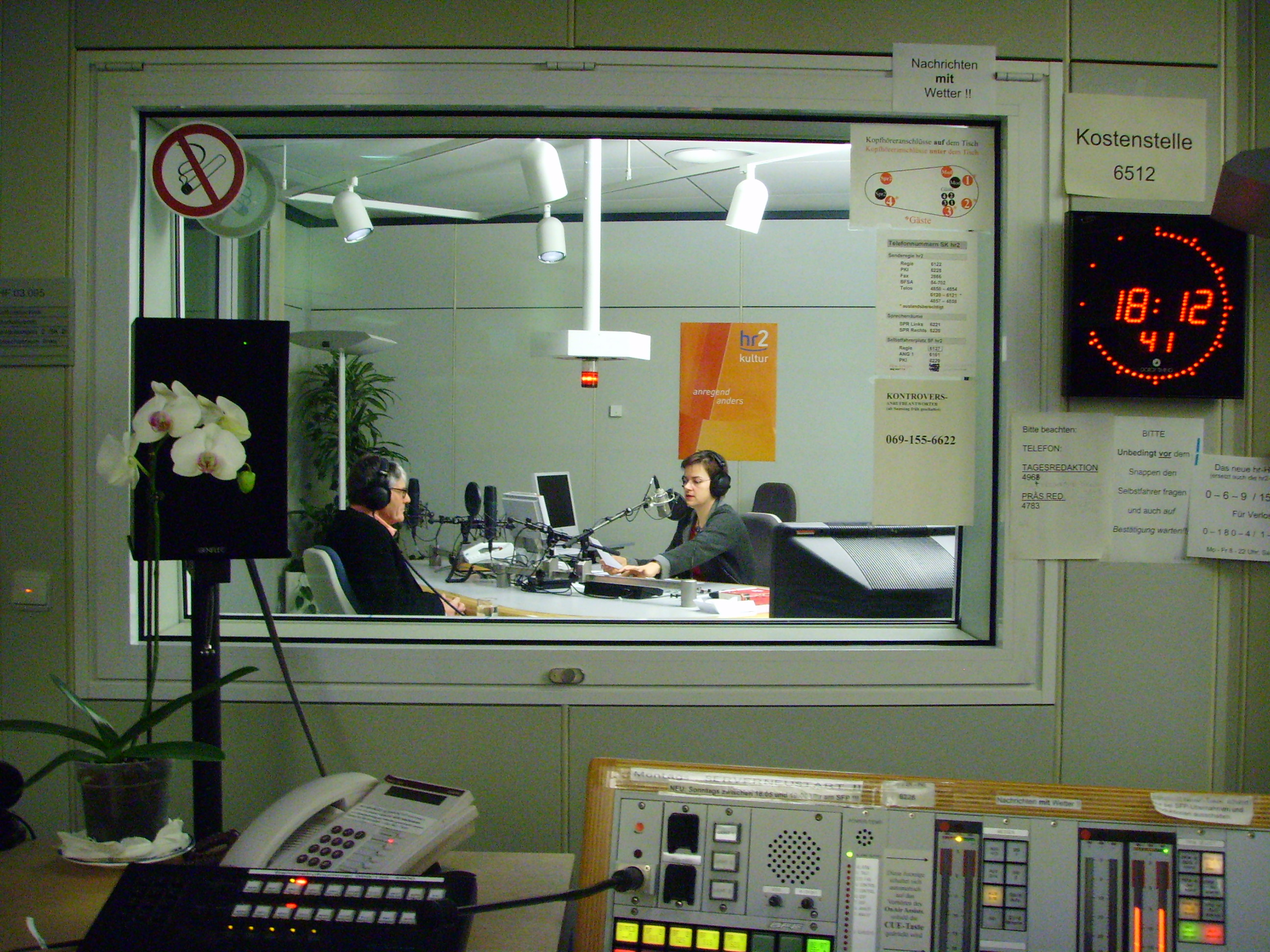 Blick vom Mischpult in den hr2-Sprecherraum hr2-Sendekomplex, Frankfurt am Main eigene Aufnahme